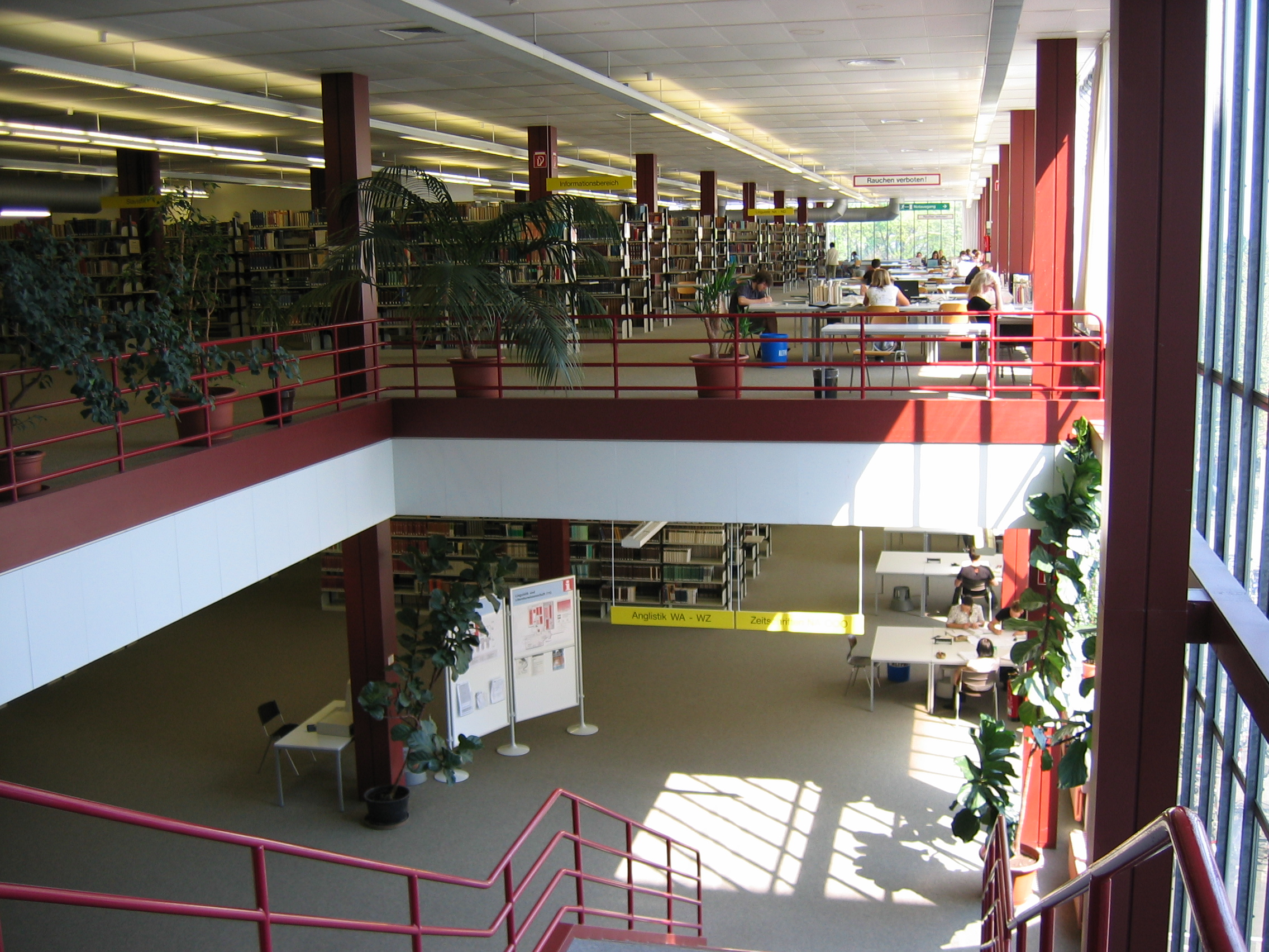 Lesesaal in der Universitätsbibliothek Bielefeld